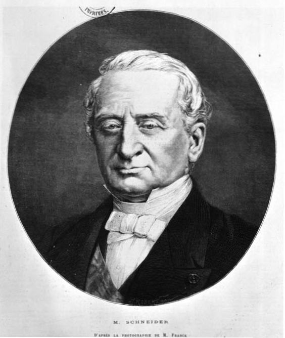 Un des fondateurs de Schneider Electric